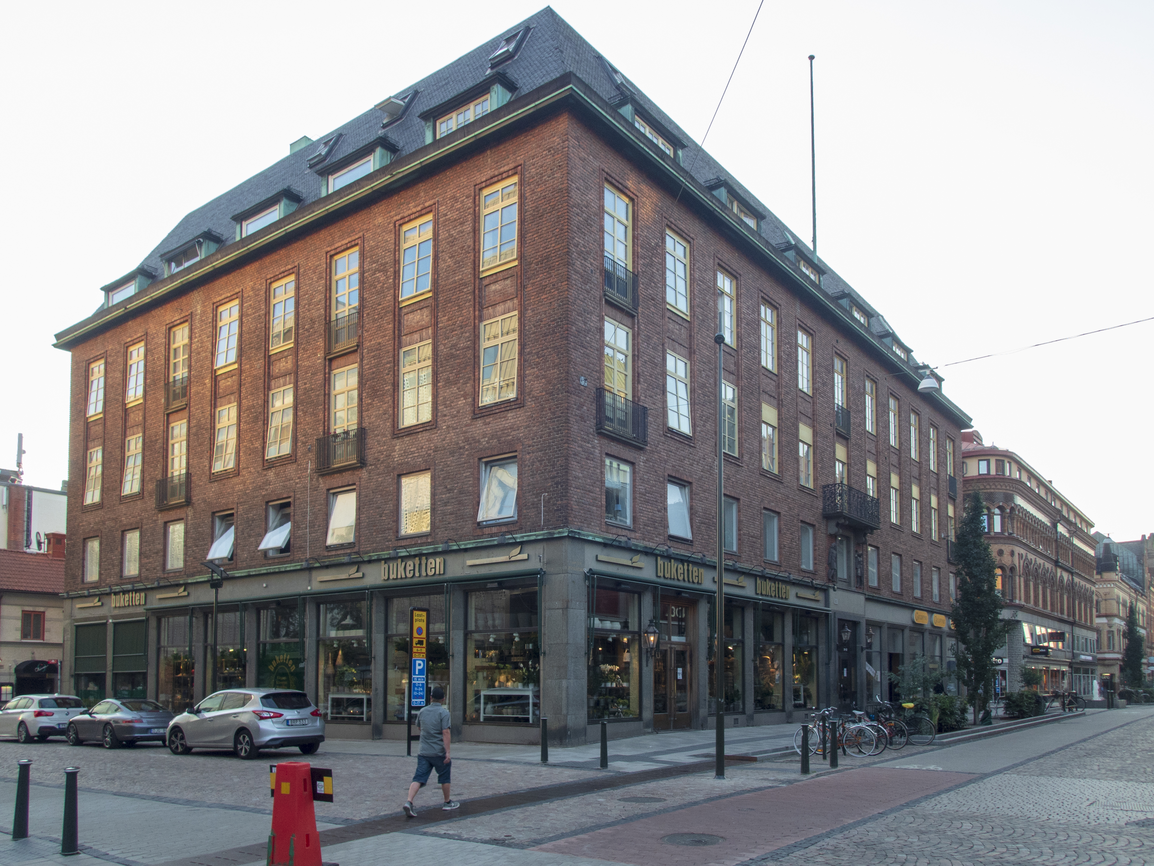 Narcissus 5, Borås. Hus uppfört 1926-1928 för AB Borås Bank (från 1942 som Skandinaviska Banken). Arkitekt: Ivar Tengbom